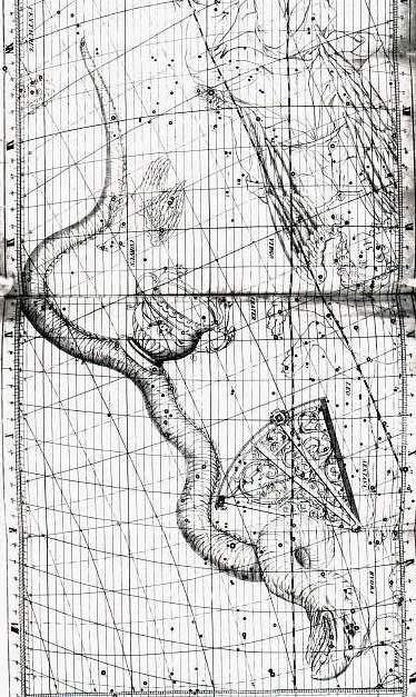 Hydra